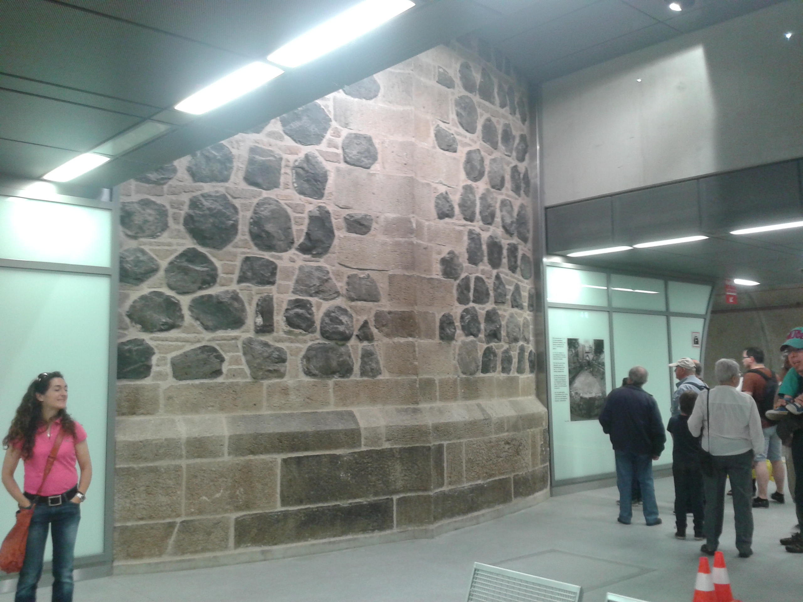 Die Reste der Fassade des Turms des Bollwerks der Ḱölner Stadtmauer am Chlodwigplatz, die beim Bau des U-Bahnhofs am selbigen Platz gefunden wurden und in ihm wiederaufgebaut wurden.